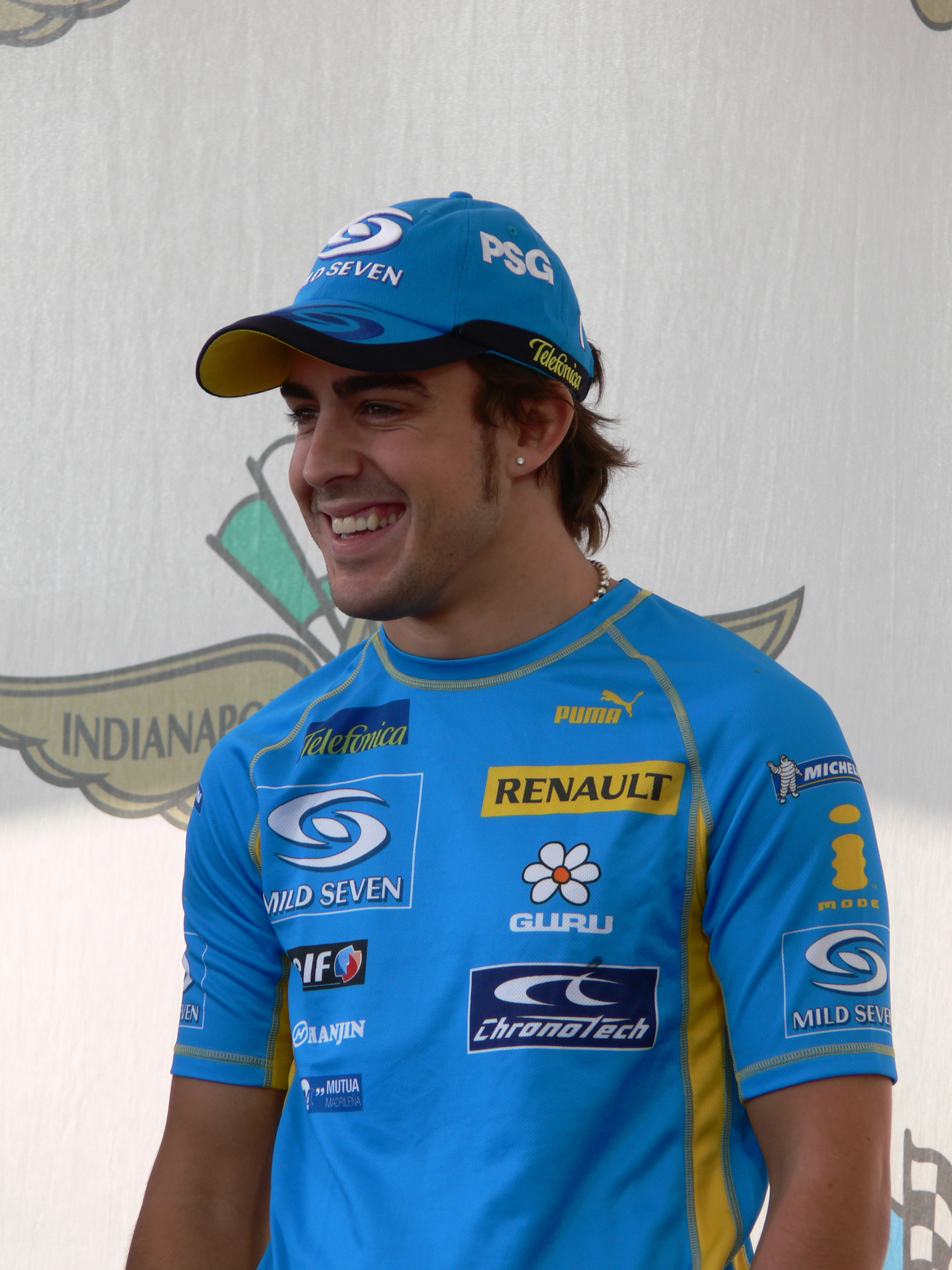 終始笑顔でした